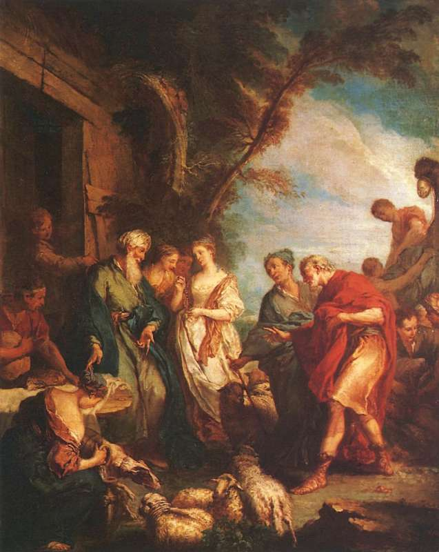 Auteur de l'oeuvre : FRANCOIS BOUCHER Domaine : Beaux-Arts Technique : Huile sur toile. Date de production : Vers 1725 Dimensions : 85 cm x 100 cm Musée : Musée des Beaux-Arts de Strasbourg - Musée de France Numéro d'inventaire : 44.985.2.1 Année d'acquisition : 1985